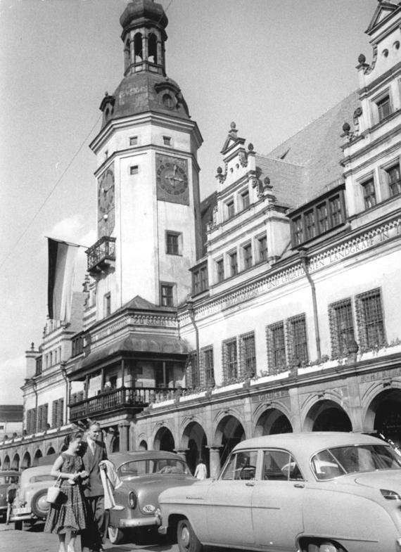 Leipzig, "Altes Rathaus" Zentralbild Krüger We.-Bö. 31.8.56 Leipziger Herbstmesse 1956 Das alte Leipziger Rathaus.